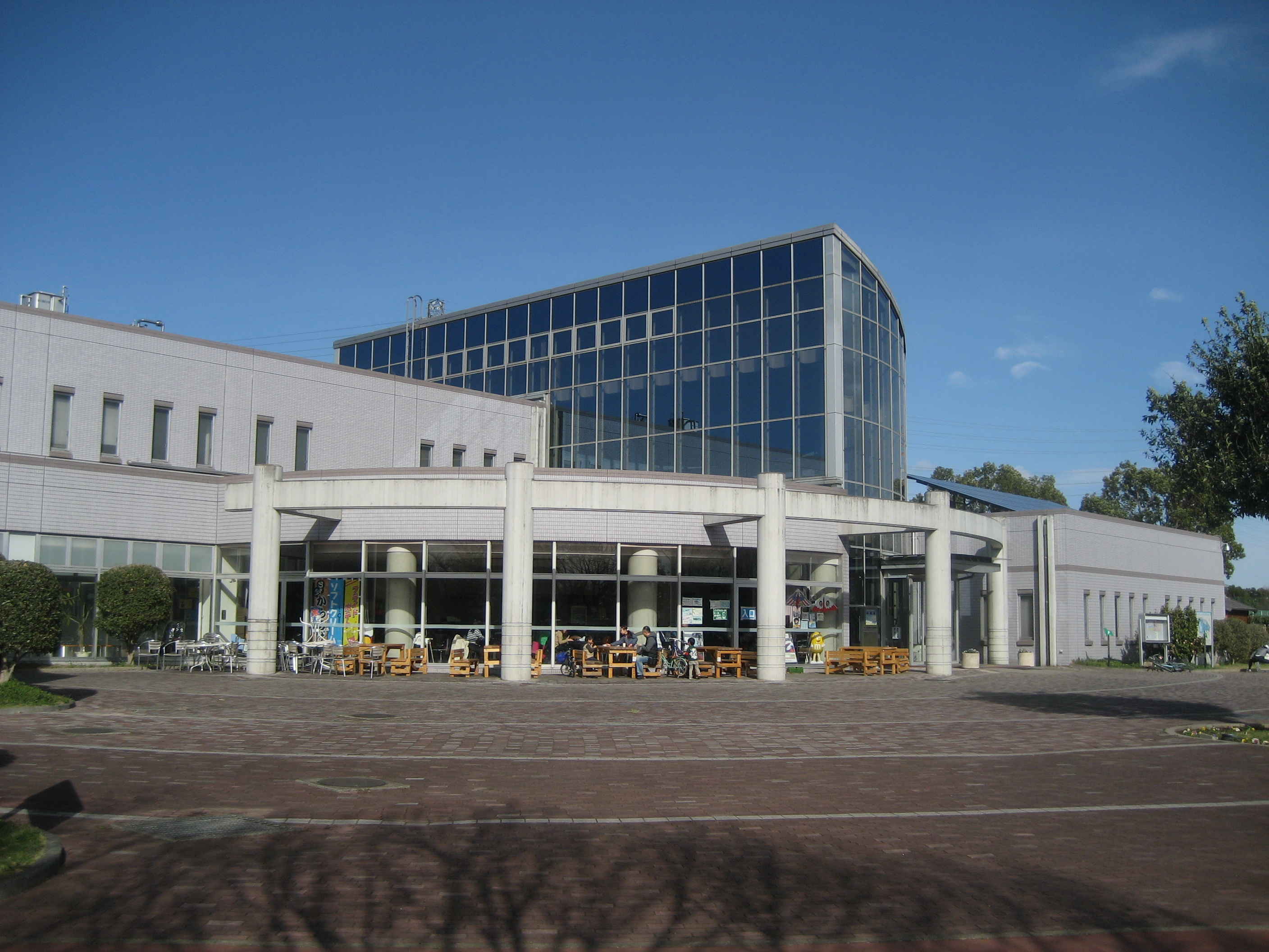 埼玉県越谷市にある県民健康福祉村ときめき元気館